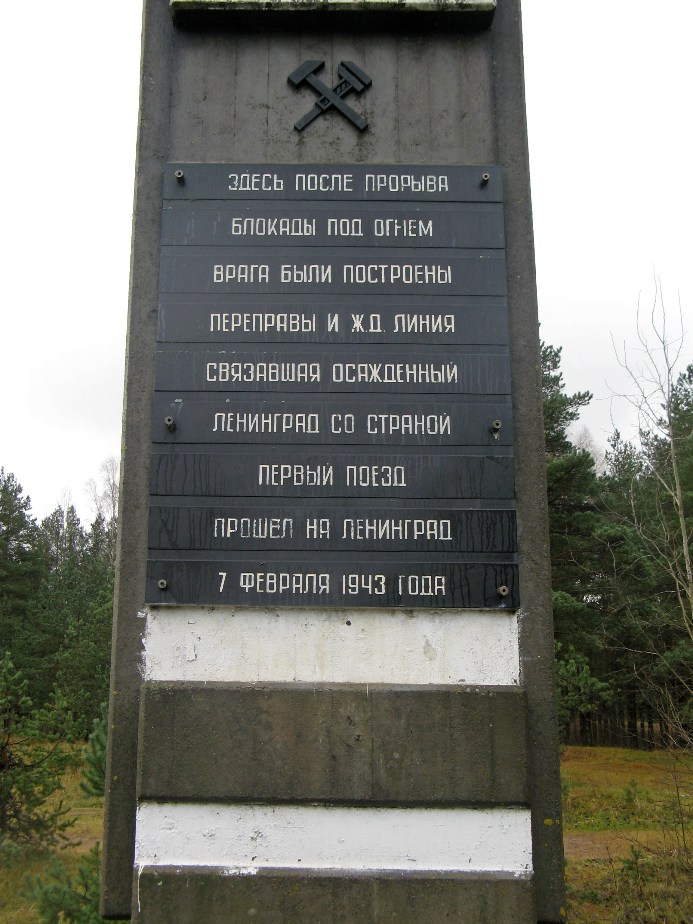 Памятный знак: 61 км Мурманского шоссе, у поворота на посёлок, Приладожский, Кировский район, Ленинградская область